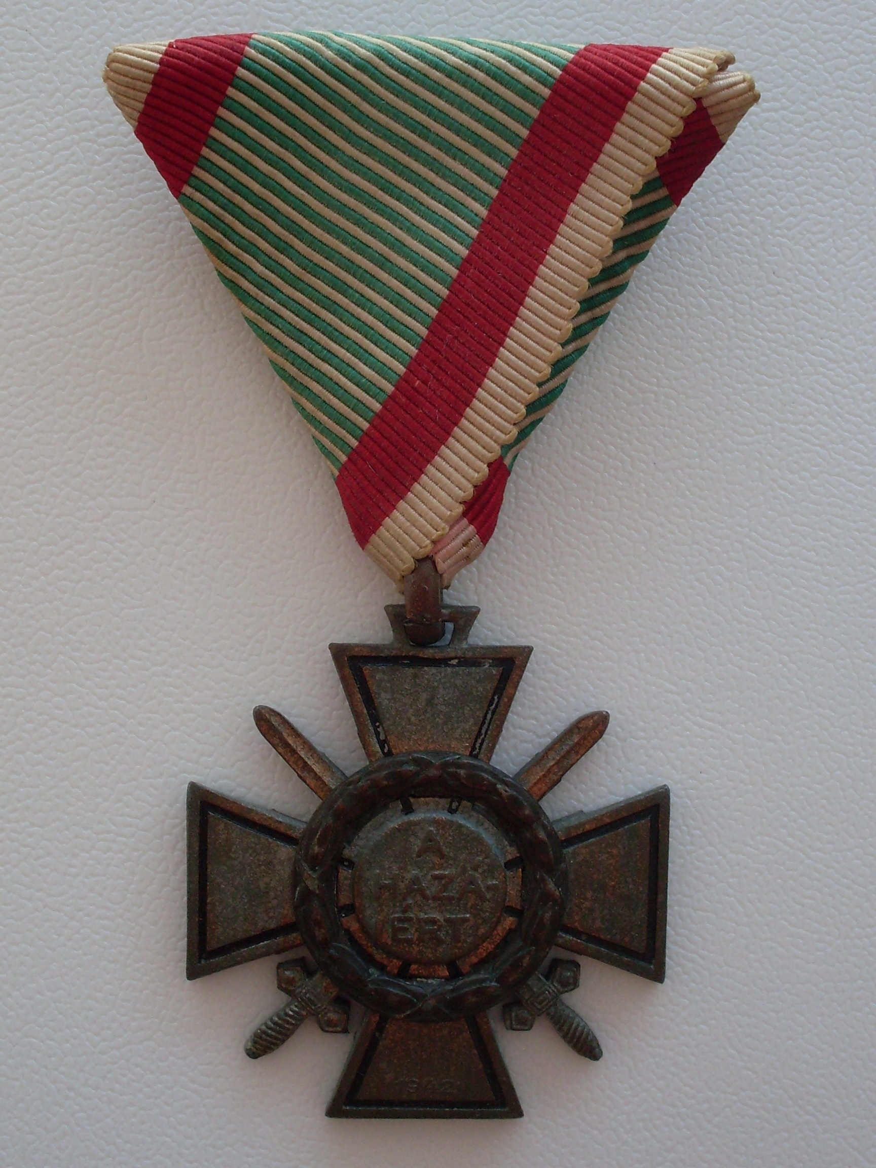 Ungarisches Frontkämpferkreuz (Vorderseite)